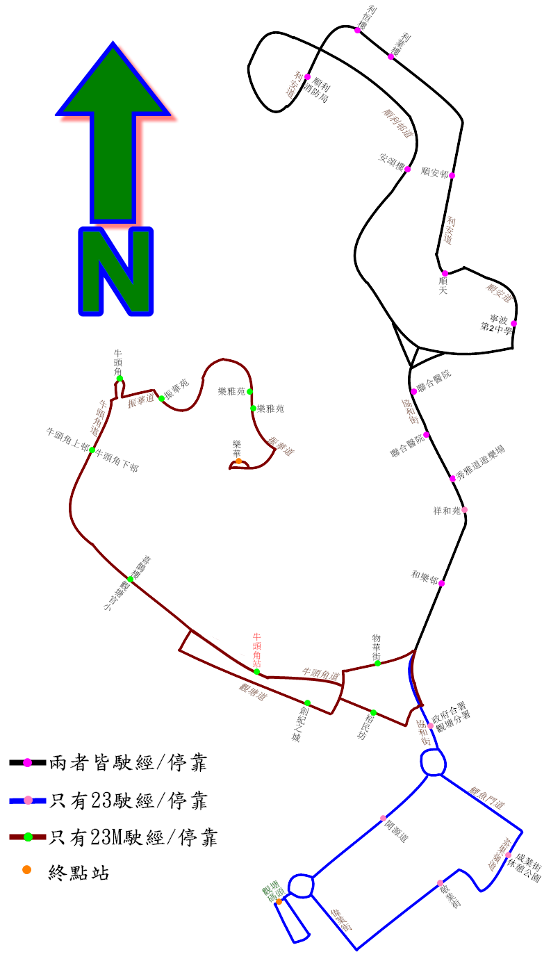 中文（香港）: 九巴23號線及23M線的走線圖，當中藍線表示只有23號駛經，而啡線則表示只有23M線駛經